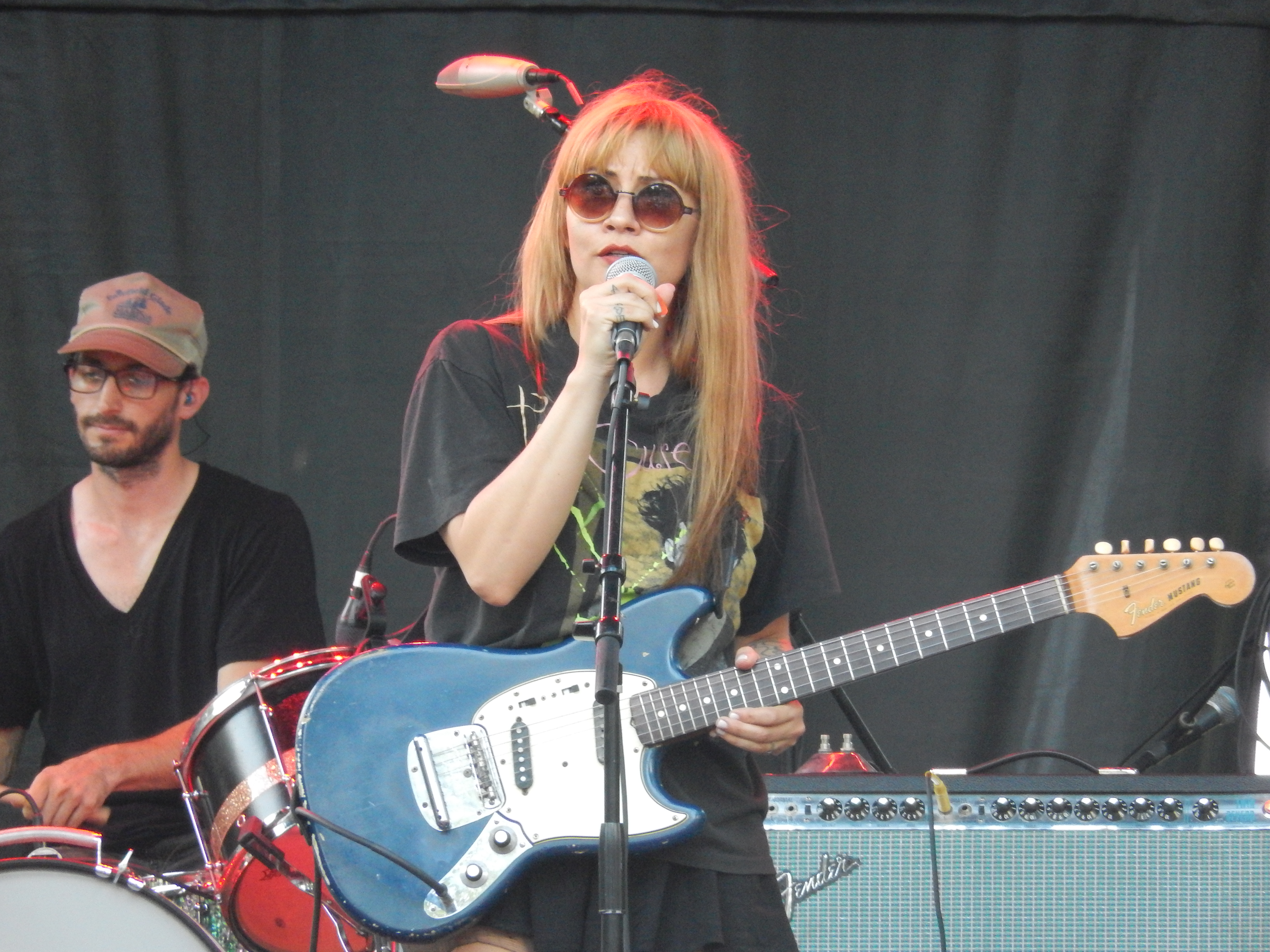 Frankie Rose